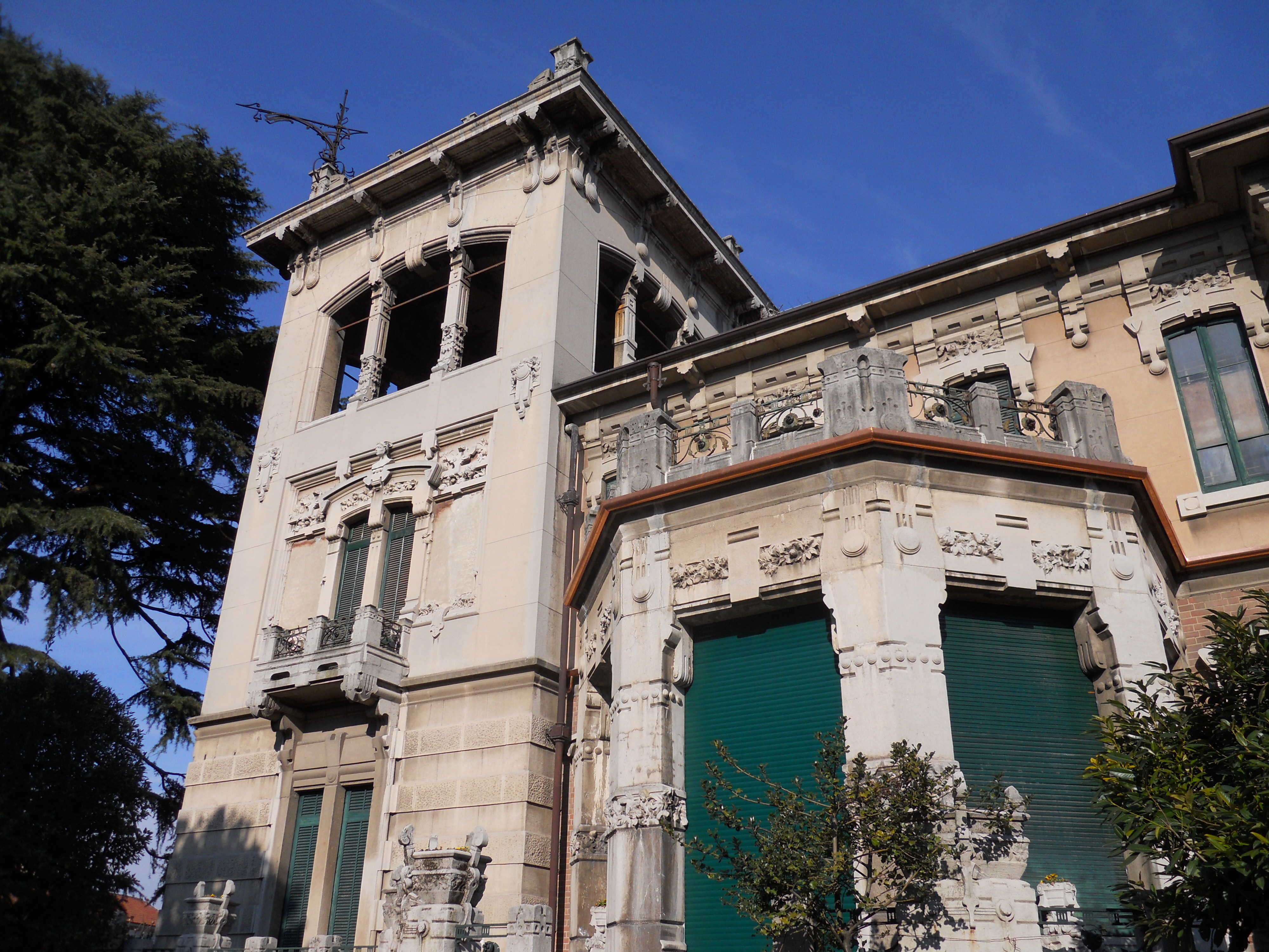 Parabiago. Villa Ida Lampugnani Gajo. Torretta This is a photo of a monument which is part of cultural heritage of Italy.